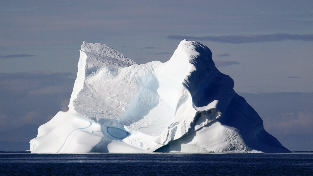 Eisberg in der Diskobucht, Westgrönland